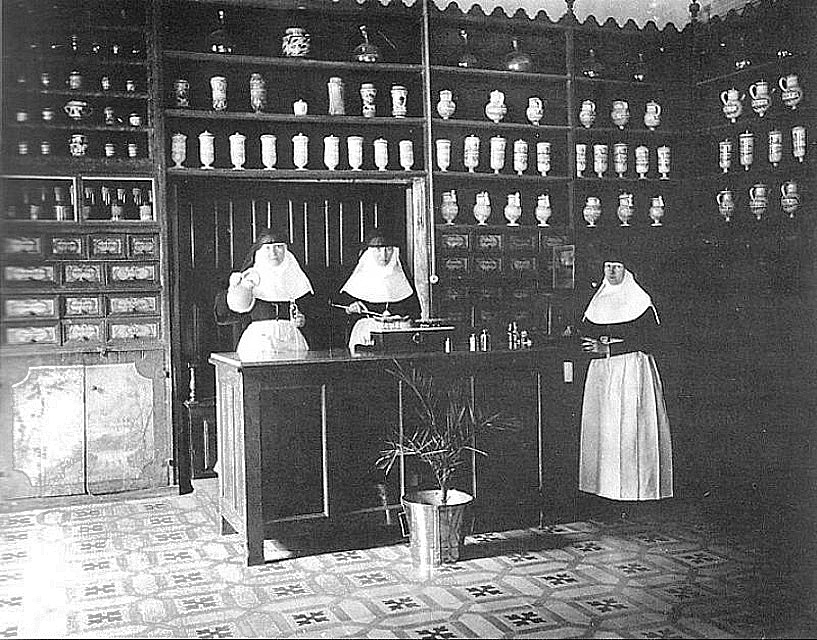 Pharmacie de l'Hôtel dieu de Carpentras en 1930, Au centre Soeur Marie-Gabriel, née Rose Courveille, directrice de la maternité, à sa droite soeur Anne de Jésus, à sa gauche soeur Agnès